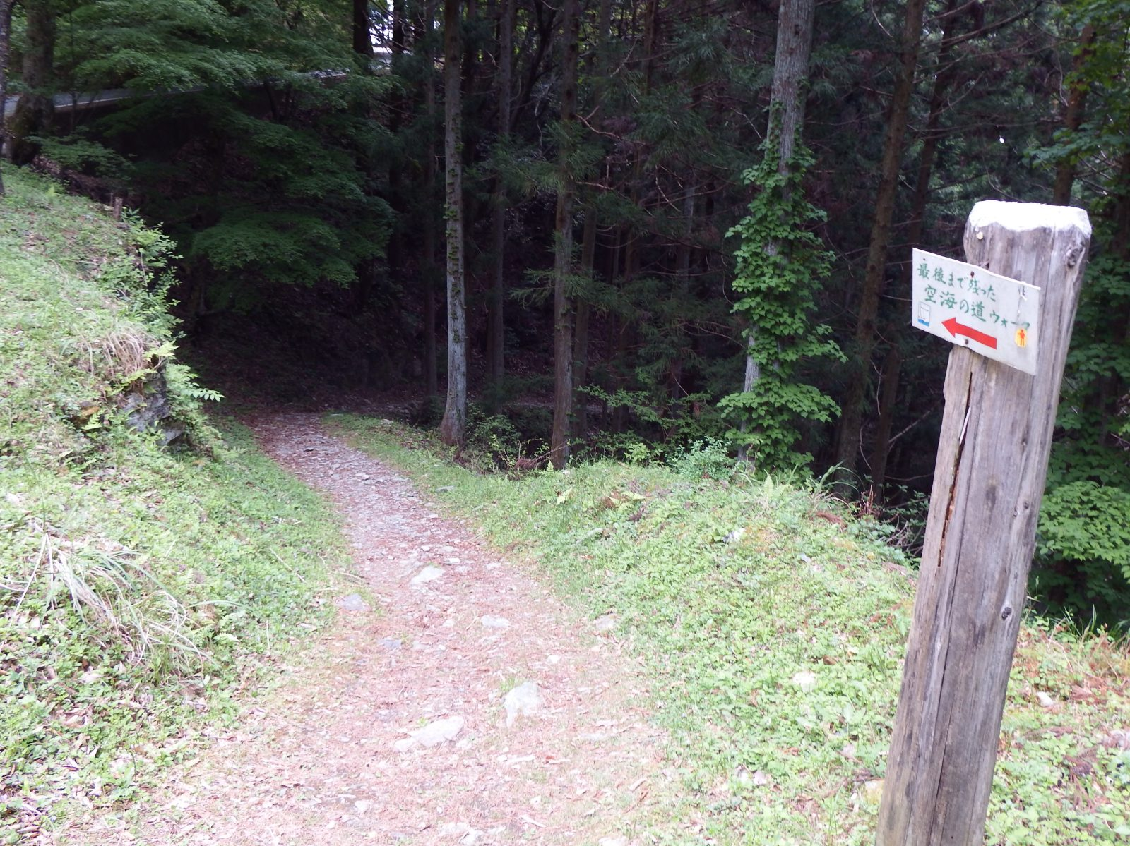 阿波遍路道 一宮道